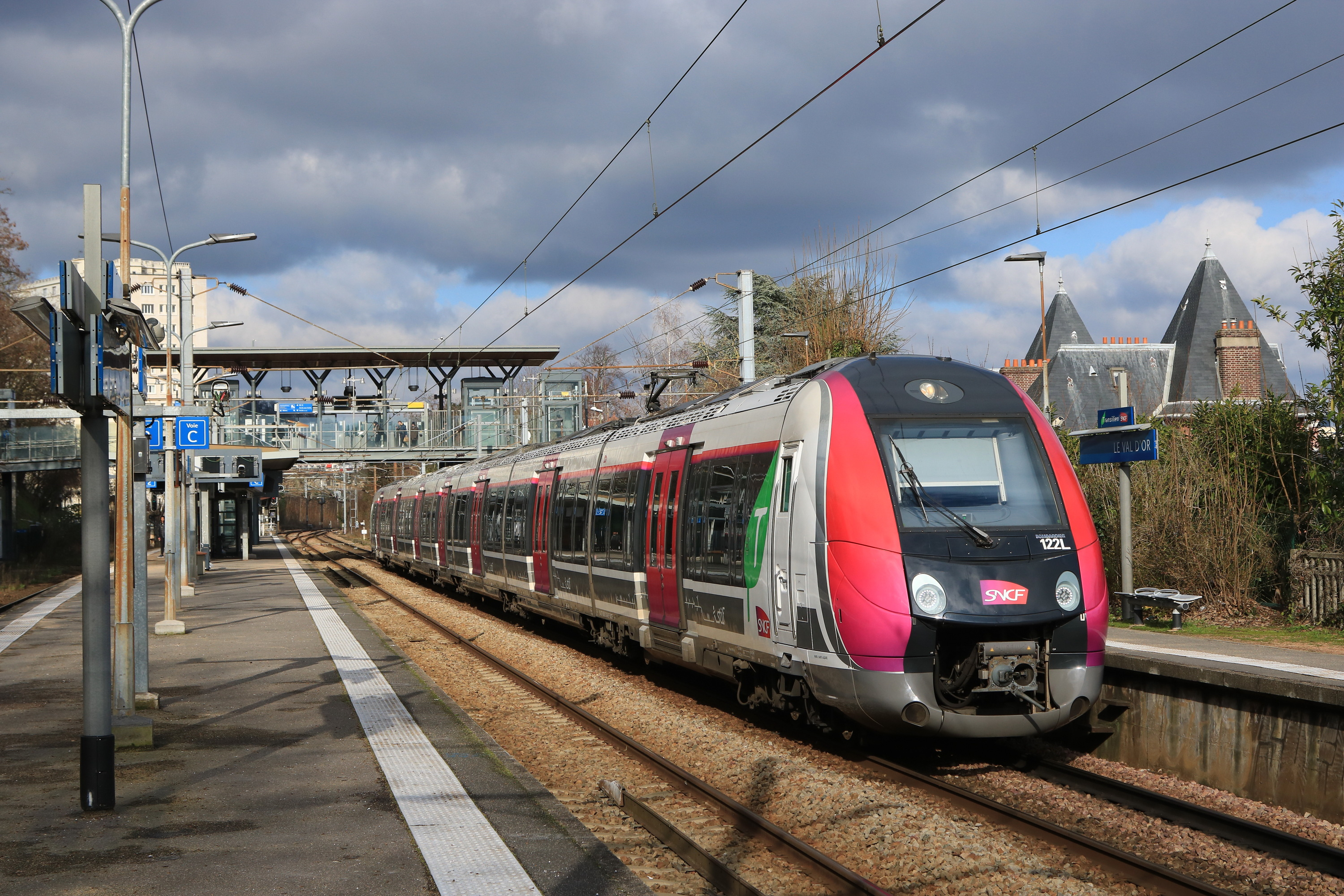 Z 50243/4 (122L) sur une mission Paris-Saint-Lazare - Saint-Cloud repart de la gare du Val d'Or.